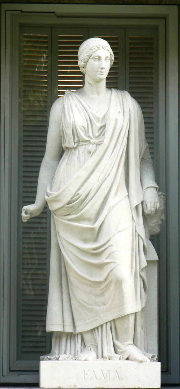 Estatua alegórica de la Fama, esculpida en mármol entre 1830 y 1836, por Valeriano Salvatierra, en la fachada del Museo del Prado, Madrid.